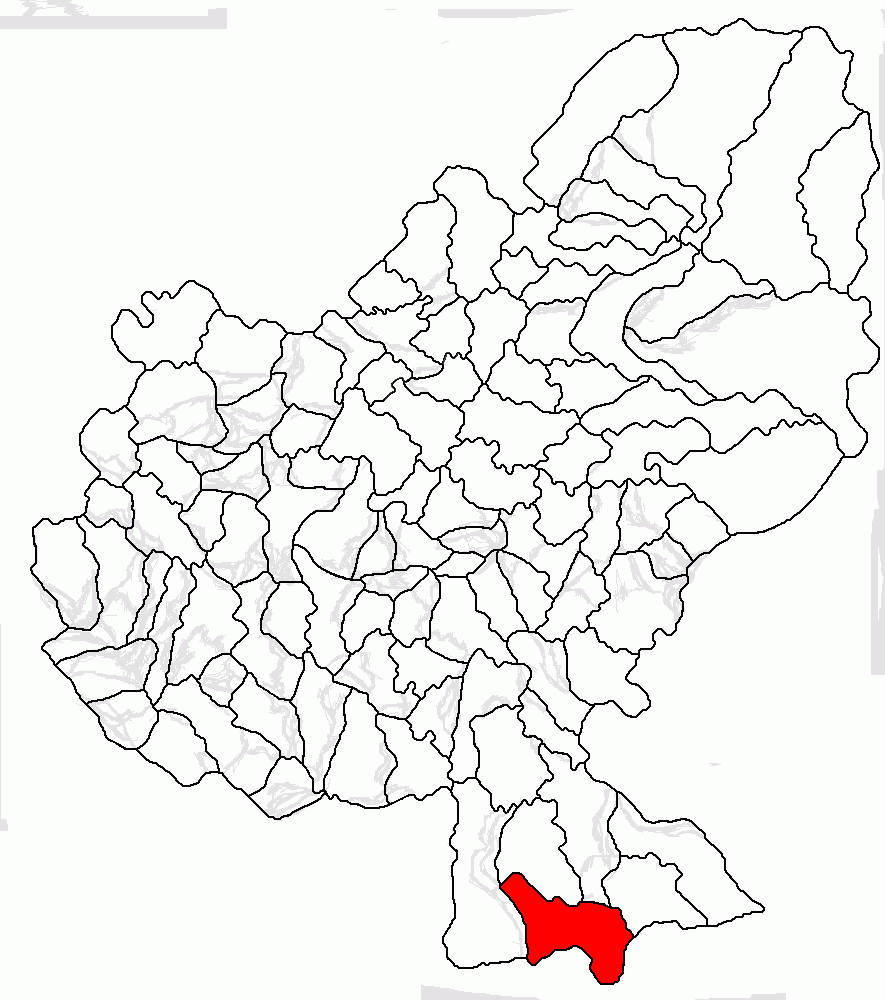 Categorie:Hărţi ale judeţului Mureş